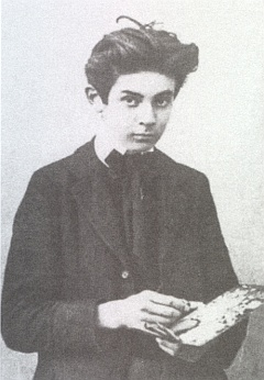 Egon Schiele (1890 - 1918), Rakouský malíř a kreslíř.